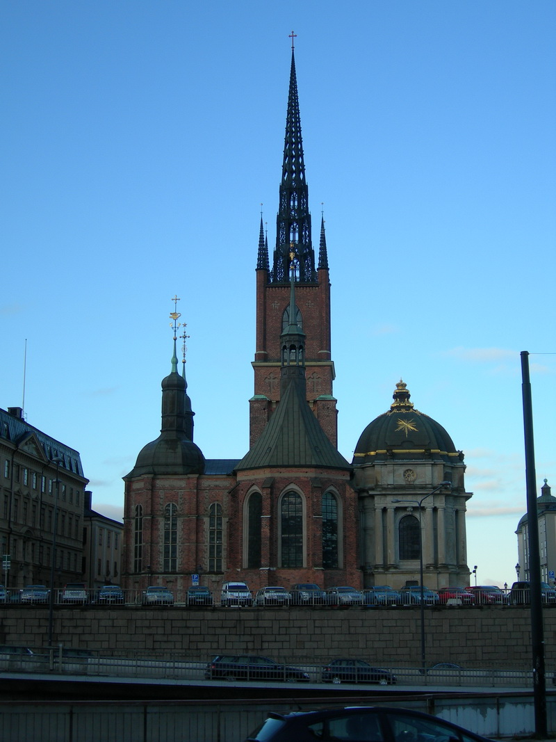 Riddarholmskyrkan, Риддархольмская церковь, Стокгольм, Швеция, вид с Gamla stan